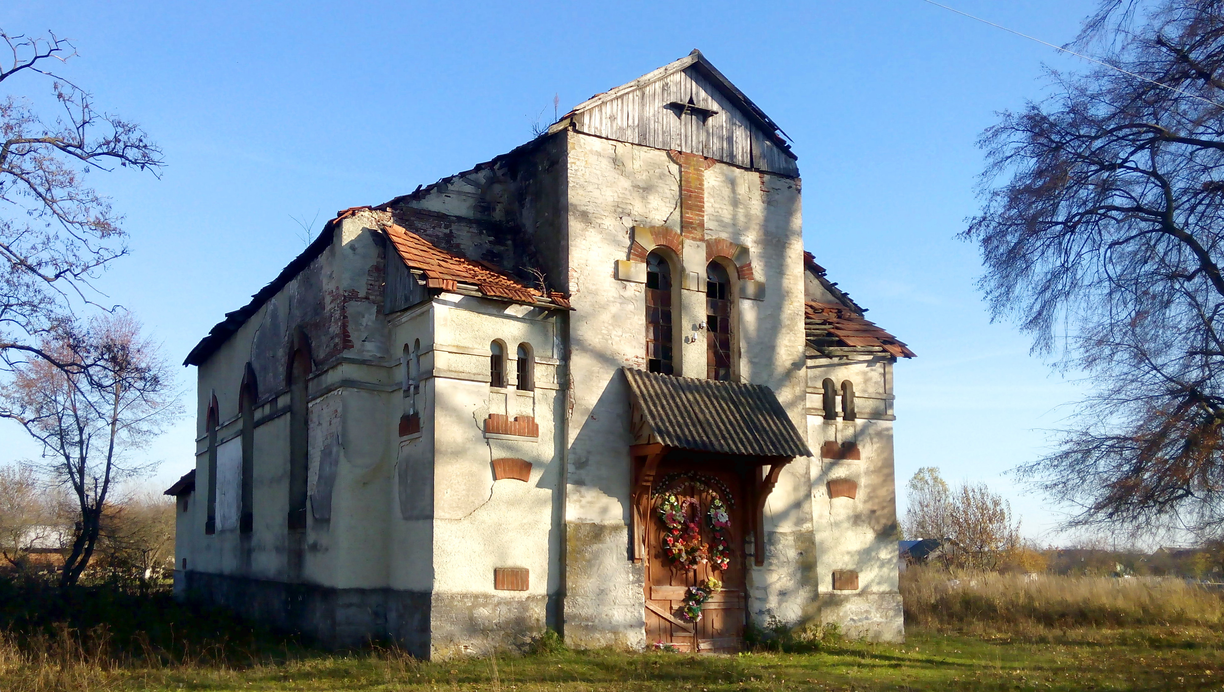 Світлина костелу-каплиці Божої Матері, 1908p. у с. Задвір'ї. Львівської обл., Буського р-н.